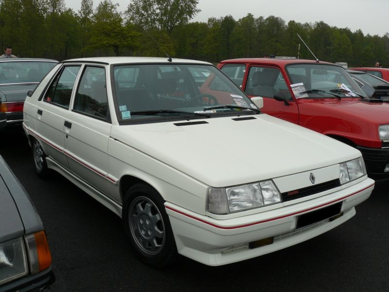 Français cadien: Montlhery Avril 2012